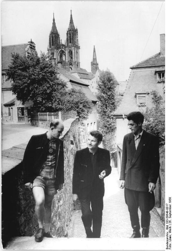 Meißen, Dom Zentralbild Löwe Weiß Weiß-Qu 26.9.1958 Fünf Jahre LPG-Hochschule in Meißen Am 1. September 1958 konnte die Hochschule für Landwirtschaftliche Produktionsgenossenschaften in Meißen auf ihr fünfjähriges Bestehen zurückblicken. Der V. Parteitag der SED stellt auch der Hochschule bedeutende Aufgaben, denn bis 1965 sollen mindestens 50 % aller LPG-Vorsitzenden das Ausbildungsziel der LPG-Hochschule oder einer landwirtschaftlichen Fakultät erreichen. - Zur Zeit nimmt das Internat der Hochschule 320 Studenten auf, die ein dreijähriges Studium absolvieren. 67 erfahrene Genossenschaftsbauern über 40 Jahre nehmen an einem Einjahres-Lehrgang teil. Darüber hinaus betreut die Hochschule 400 Fernstudenten. Die Bewerber für das Studium werden von der Vollversammlung ihrer LPG delegiert. Sie müssen eine mehrjährige praktische Tätigkeit in der Landwirtschaft nachweisen und davon mindestens ein Jahr Mitglied einer LPG sein. Eine weitere Voraussetzung ist die abgeschlossene Grund- und Berufsschulausbildung. UBz: In der Freizeit lädt die schöne alte Stadt Meißen zu Spaziergängen ein. Hier die Studenten Werner Steller, Josef Stoppok und Gottfried Wehnert.